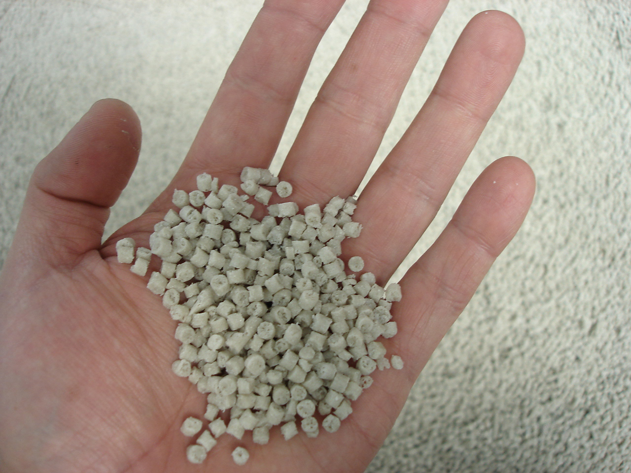 Gránulos de polímero para extrusión o inyección u otro.